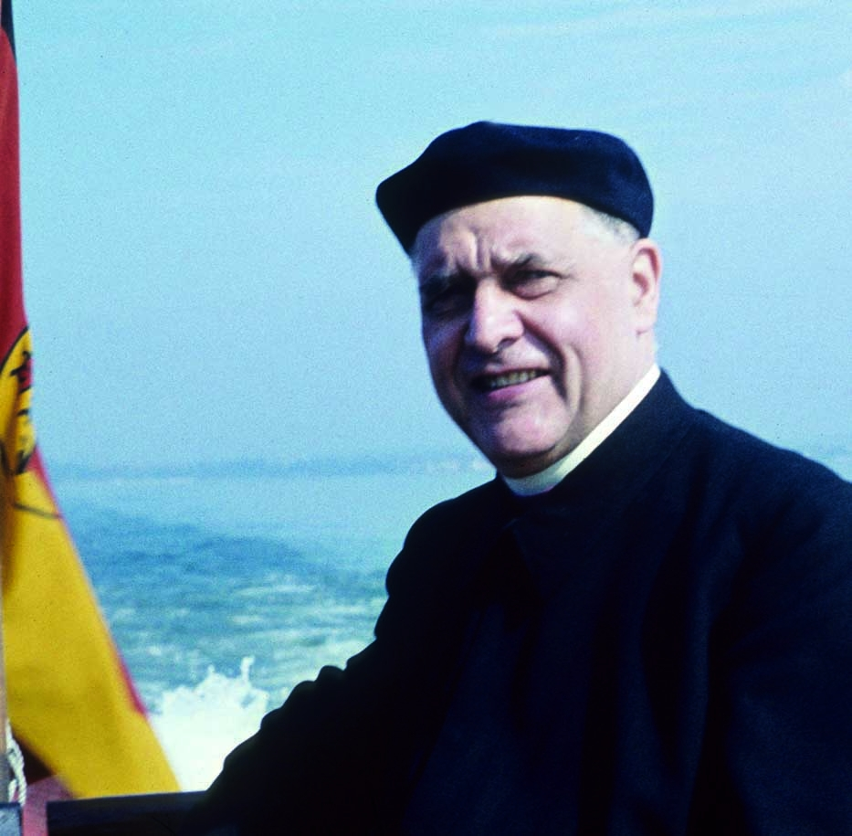 Der Mainzer Bischof Albert Stohr (1890-1961) im August 1959 bei einer Fahrt auf dem Bodensee